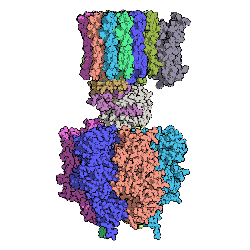 PDB ID: 1c17,1e79 PDBのデータを元にし、Molecule of the Monthモードで描写。F0モーターおよびF1モーターを表示。 Qutemol Marco Tarini, Paolo Cignoni, Claudio Montani: Ambient Occlusion and Edge Cueing for Enhancing Real Time Molecular Visualization IEEE Transactions on Visualization and Computer Graphics Volume 12 , Issue 5 , Pages 1237-1244 , 2006 , ISSN:1077-2626